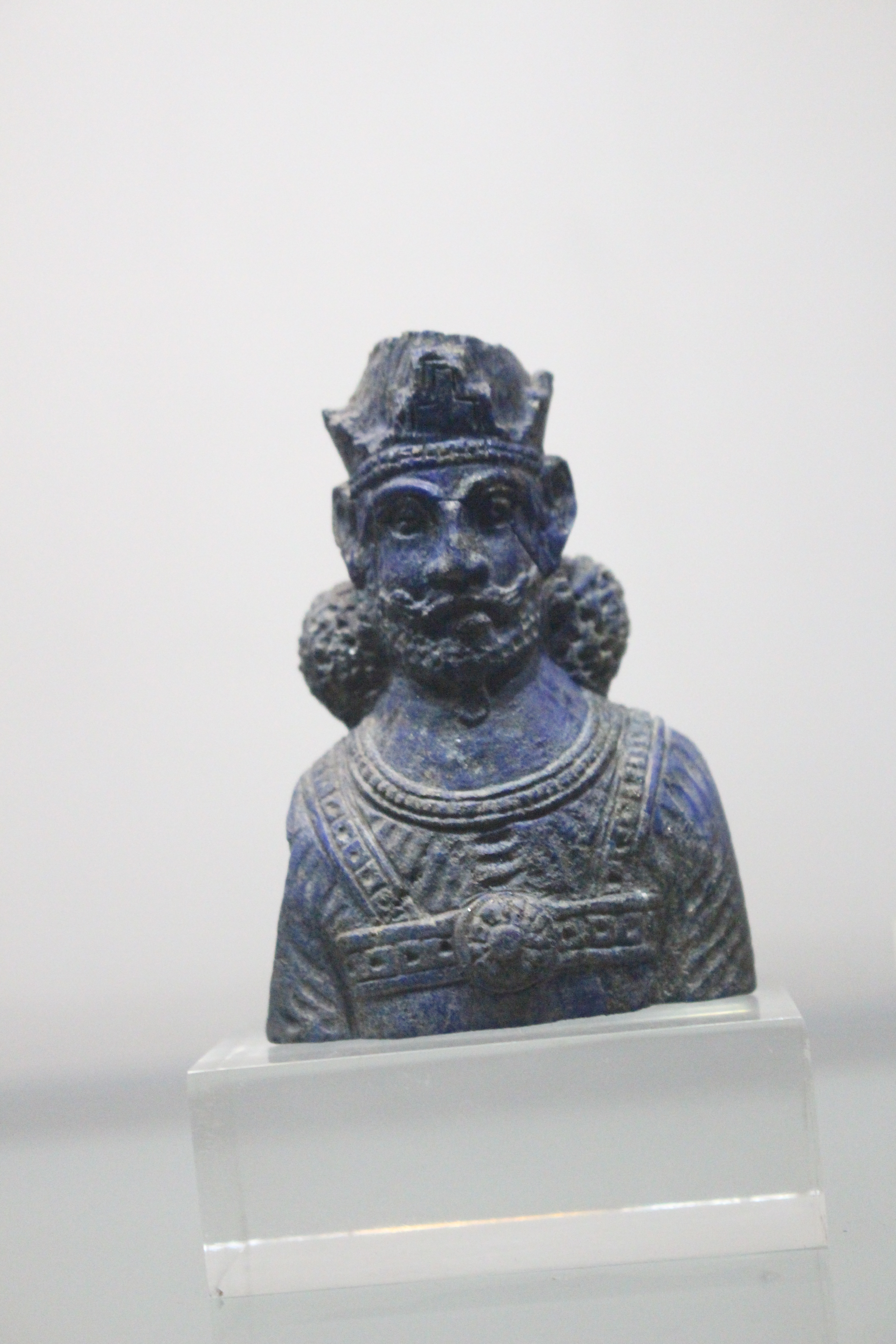 موزه رضا عباسی Reza Abbasi Museum